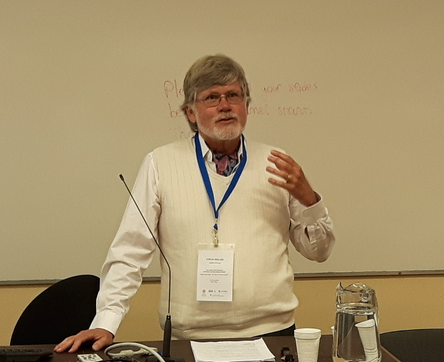 Stefan Hedlund speaking at a conference in June 2016.